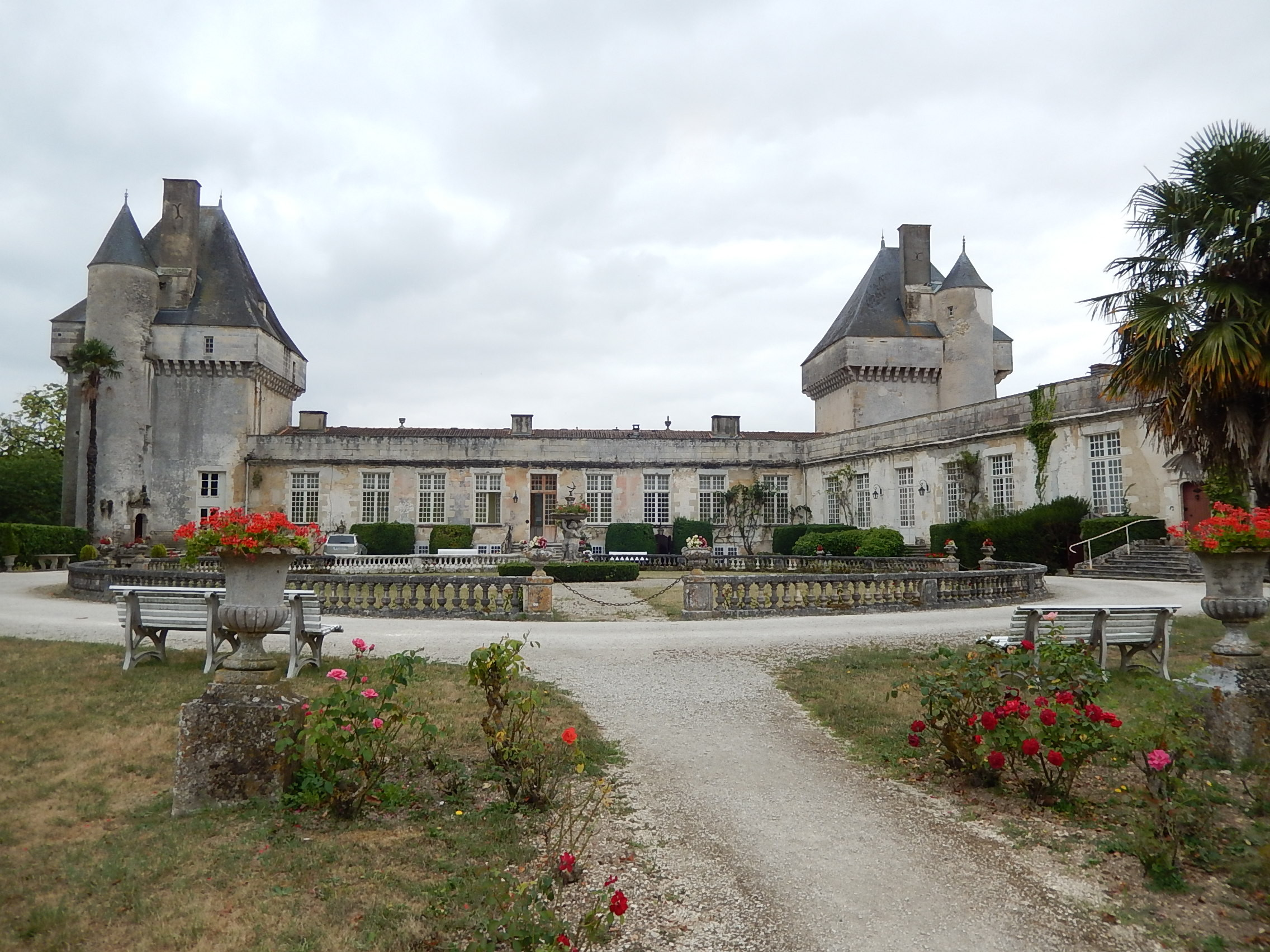 Une vue du château de Mornay ainsi que d'une partie de ses jardins, à Saint-Pierre-de-l'Isle, avec, à gauche sur l'image, la tour Richelieu.